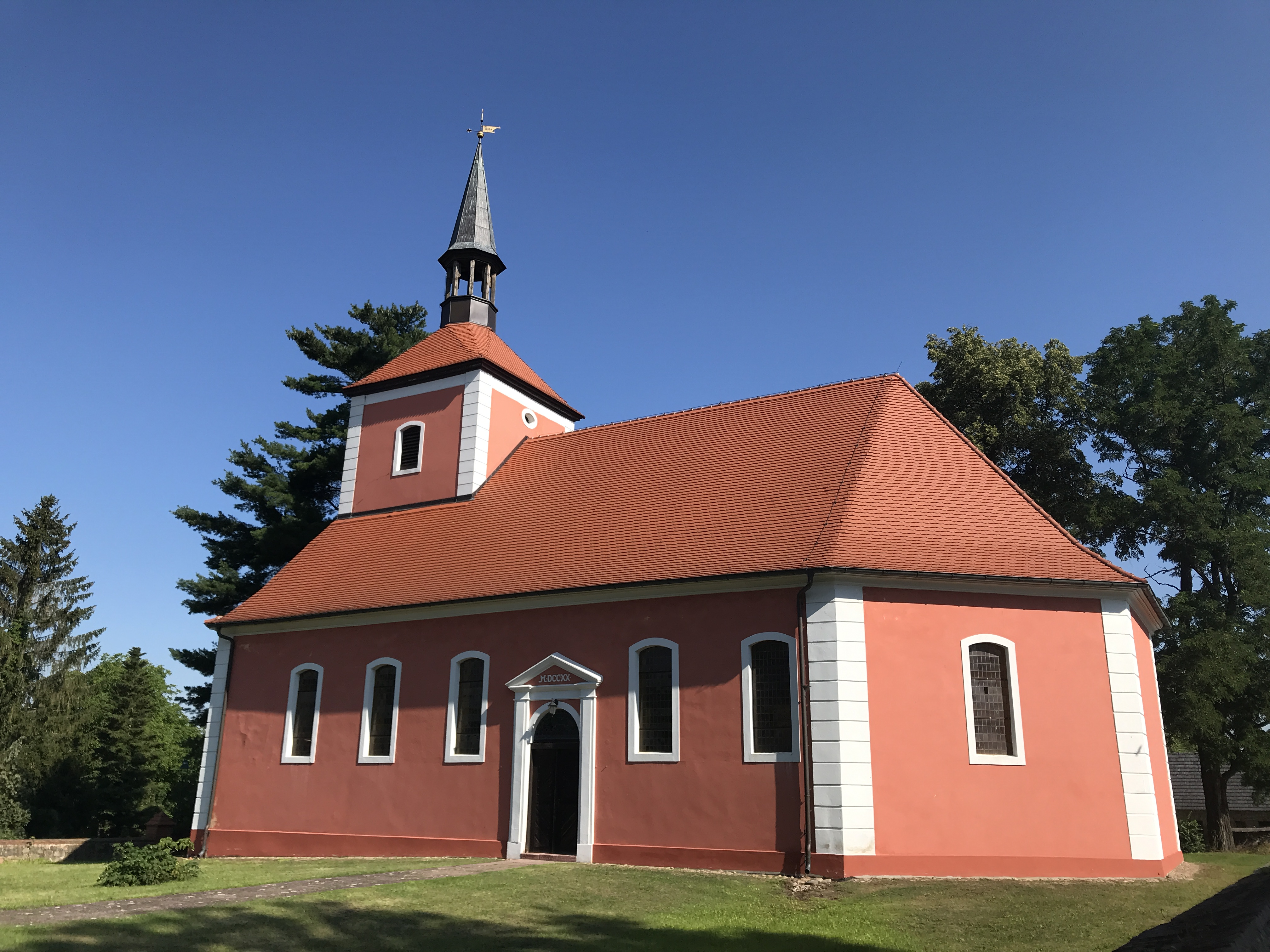 Die Dorfkirche Krügersdorf der Stadt Beeskow im Landkreis Oder-Spree ist eine barocke Saalkirche von 1720. Im Innern hängt unter anderem ein Taufengel aus der ersten Hälfte des 18. Jahrhunderts.